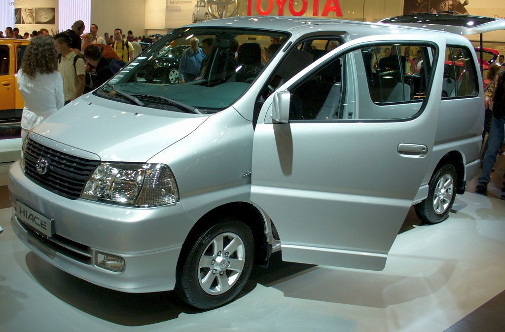 Toyota Hiace